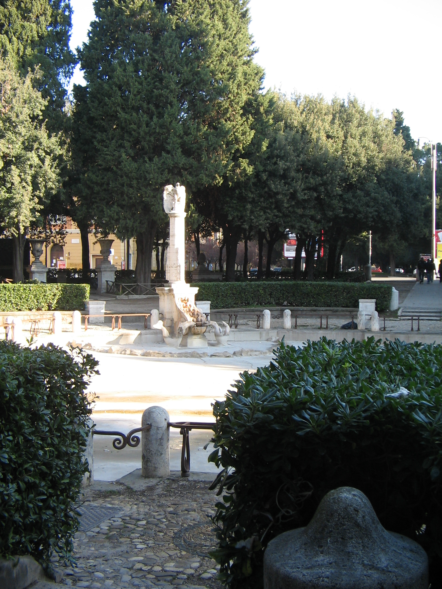 Fontana di Piazza Mazzini a Roma nel quartiere Della Vittoria